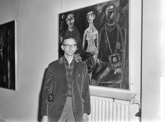 Theo van der Horst (schilder), Quarles van Ufford prijs (bij een van zijn werken)